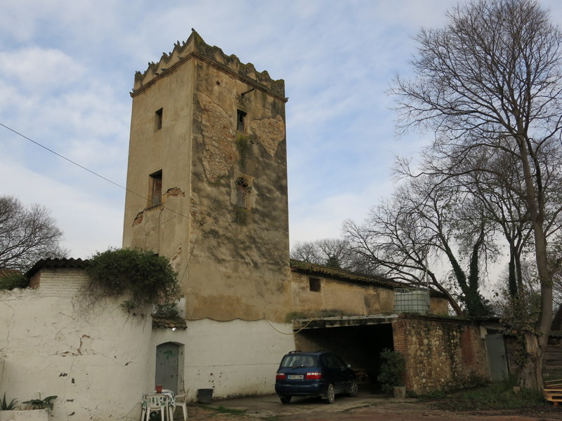 Casal de Moragues a Parets del Vallès - Catalunya